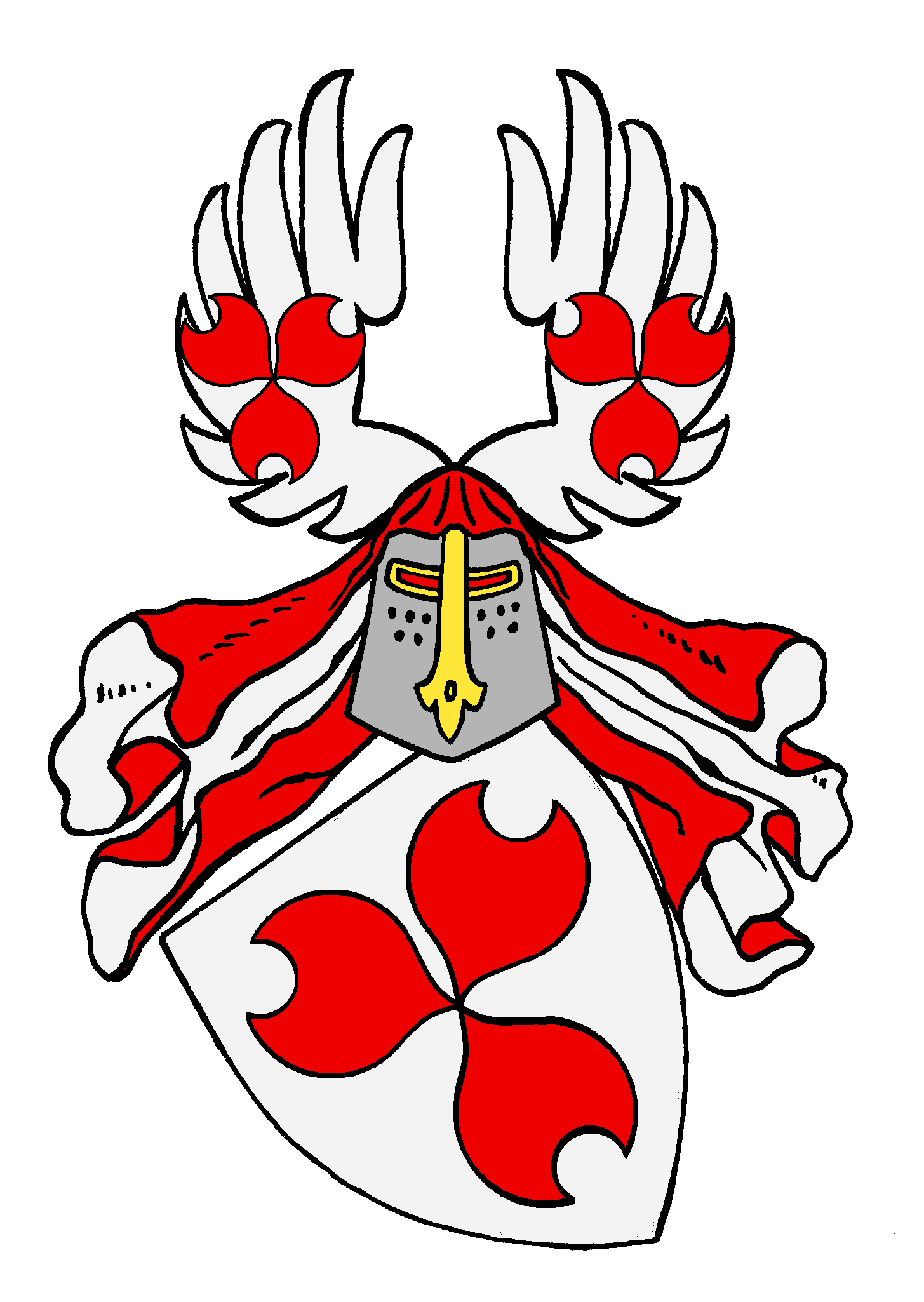 Stammwappen der Lesch (von Mülheim), einer deutschen Uradelsfamilie, die in Mulenheim, der Vorgängergemeinde von Hermannstein bei Wetzlar an der Lahn, ein Gut besaß (1386 Zehntinhaber in Rennerod im Westerwald): „In Silber drei deichselförmig zusammengestellte rote rund ausgeschnittene Seeblätter, Helmzier ein wie der Schild bez. offener Flug. Helmdecke rot-silbern.“